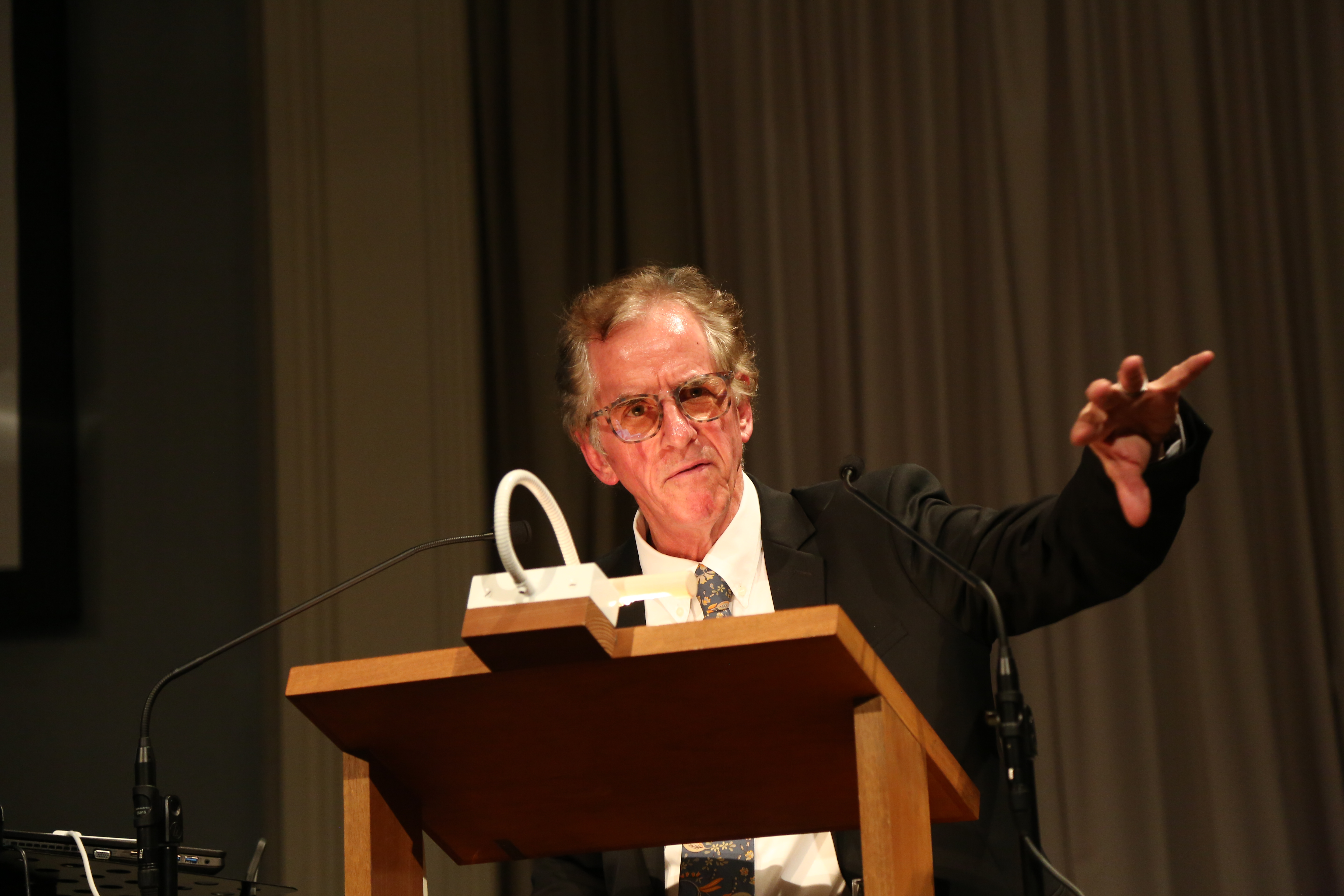 Paolo Bürgi, Professor an der Università Iuav di Venezia Verleihung des Sckell-Ehrenrings durch die Bayerische Akademie der Schönen Künste an John Dixon Hunt. 19. Oktober 2017 in der Münchner Residenz.